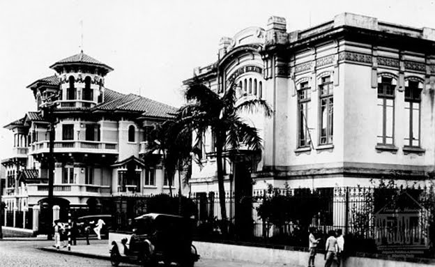 Palacete Innechi e Sociedade Recreativa, Ribeirão Preto, Brasil, 1930.